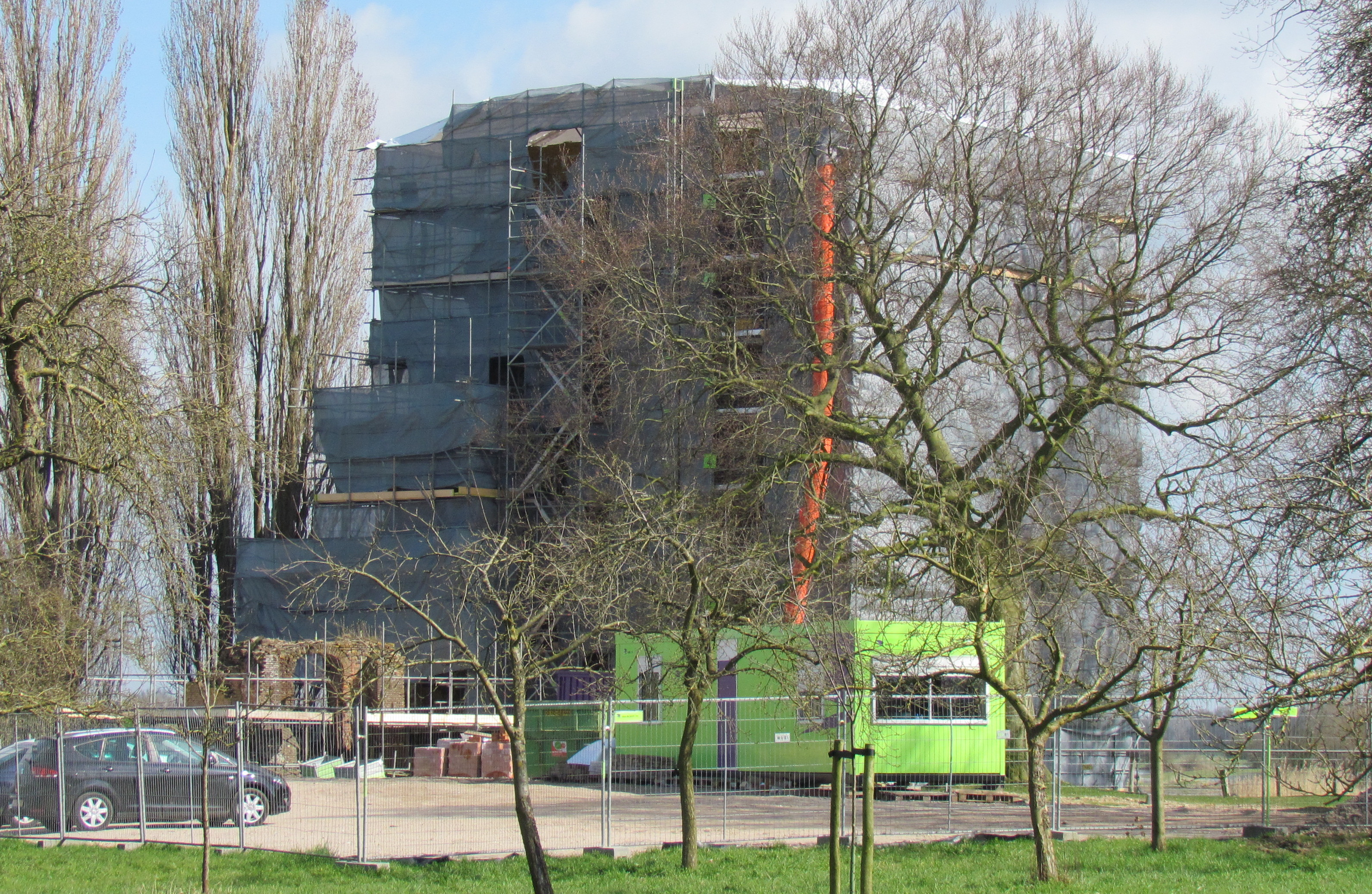 De ruïne van kasteel Nijenbeek in de steigers voor een grootscheepse consolidatie-operatie